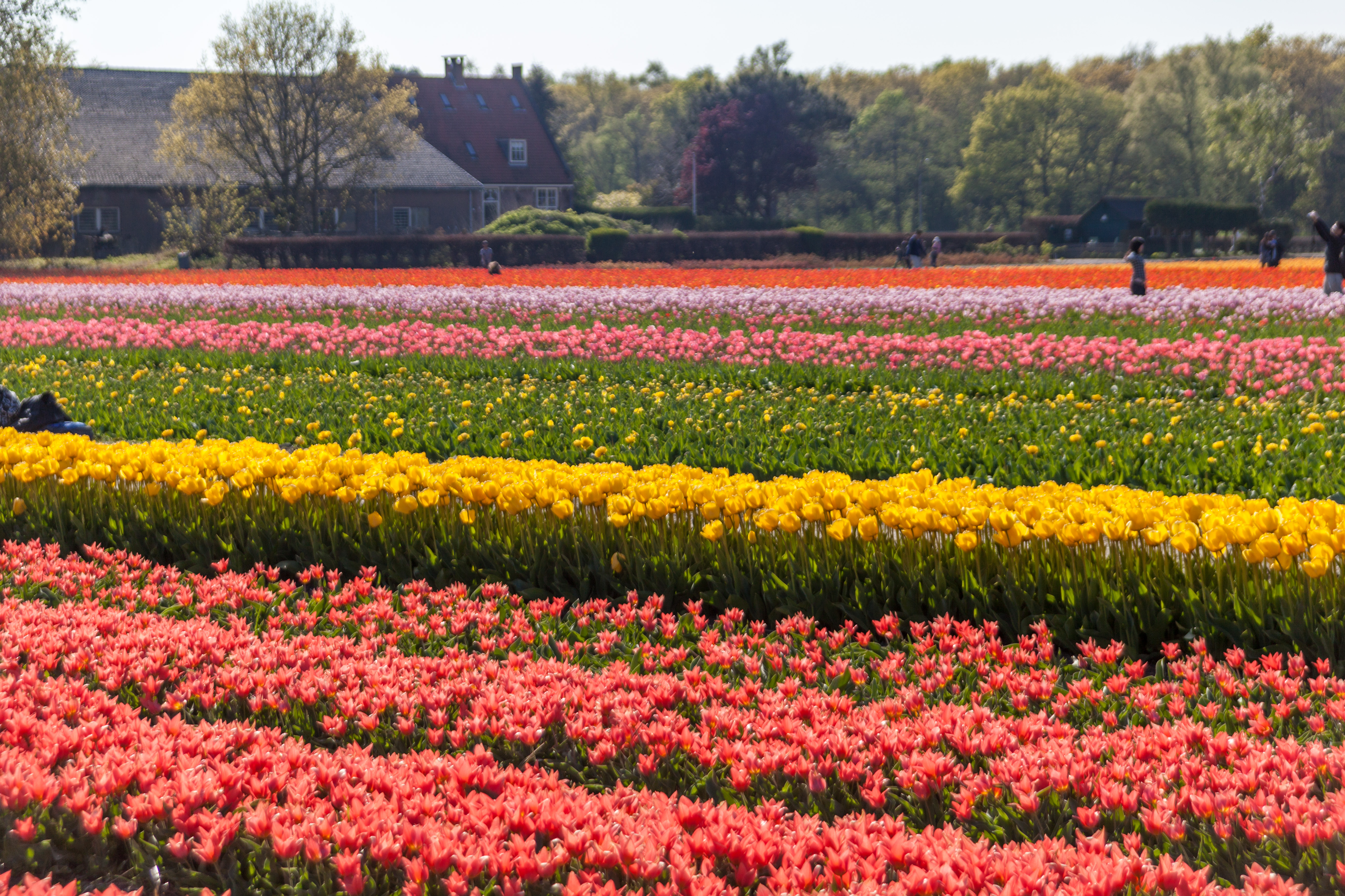 Lisse, Netherlands